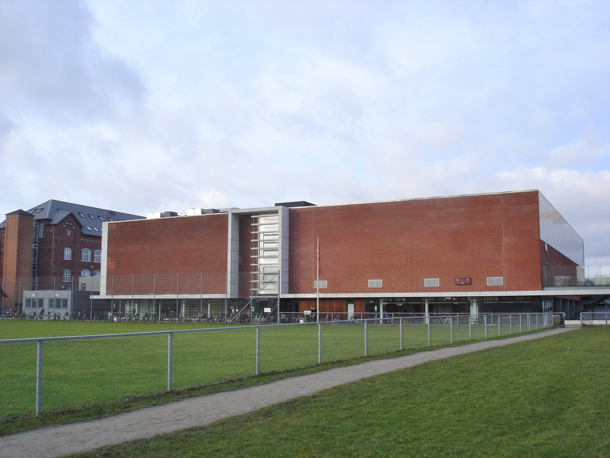 Aarhus Svømmestadion, set fra sydøst